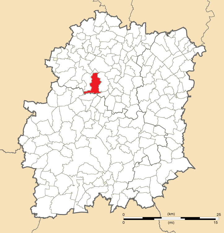 Carte de position de Bruyères-le-Châtel en Essonne (91)